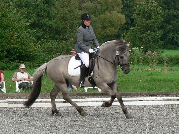 Graufalber Fjordhengst